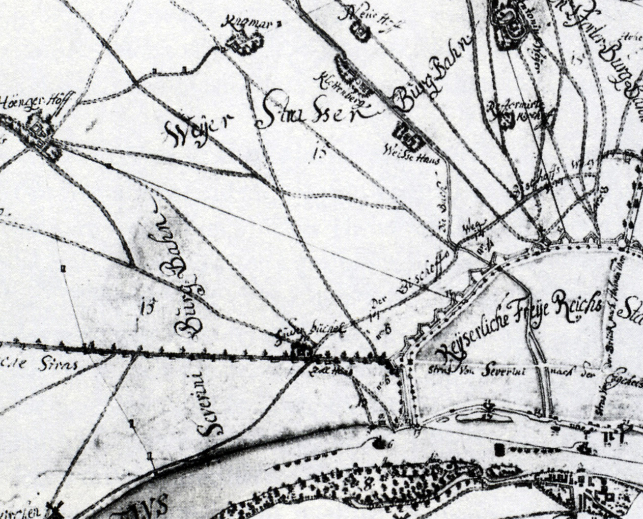 Köln im Mittelalter, nach dem Plan über den Kölner Schweid